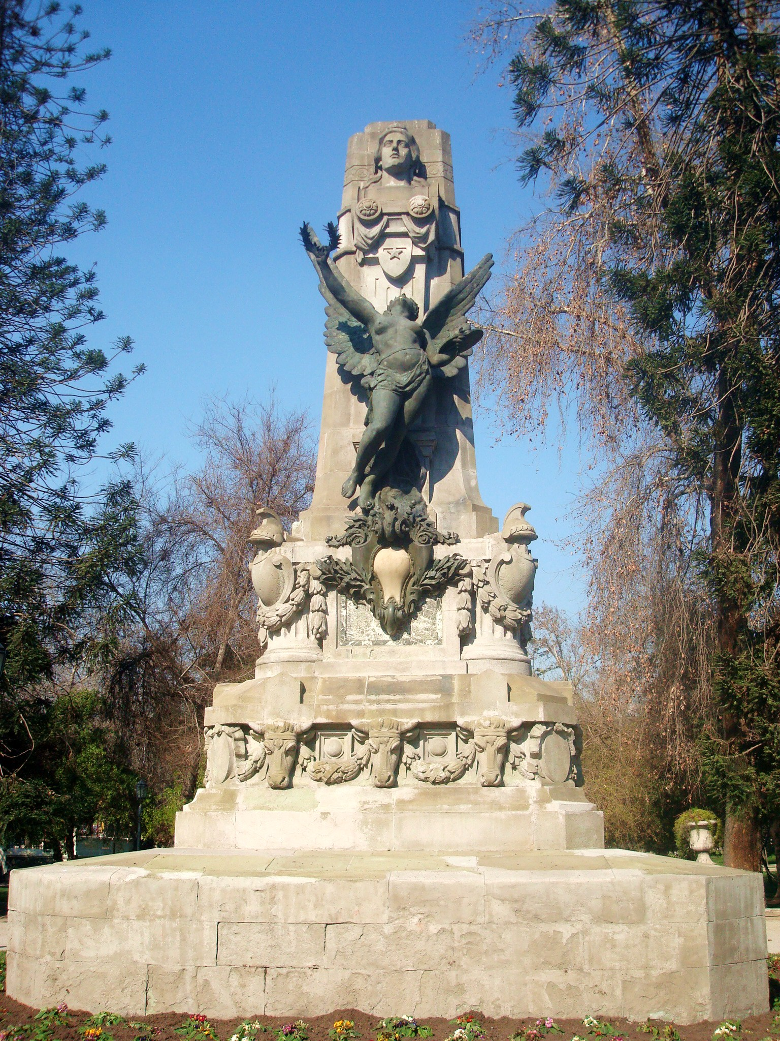 Estatua a la Gloria, obra del escultor Guillermo Córdova; 1910, bronce. Monumento de la Colonia Francesa al Centenario de la Independencia, Parque Forestal, Santiago de Chile